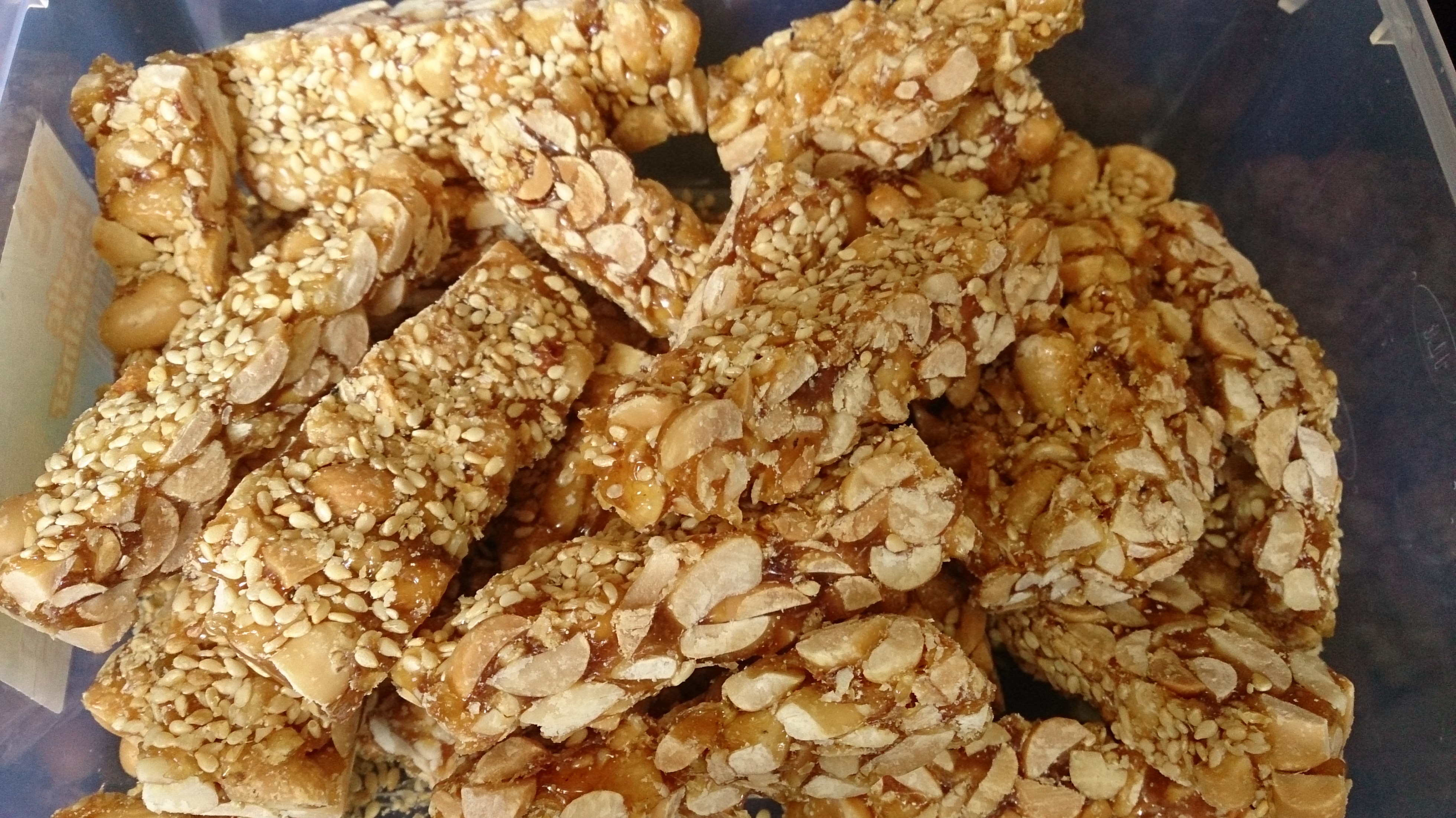 delicious